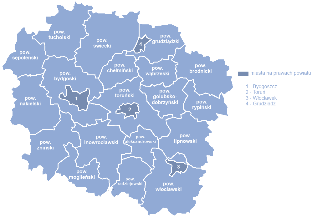 Podział administracyjny województwa kujawsko-pomorskiego